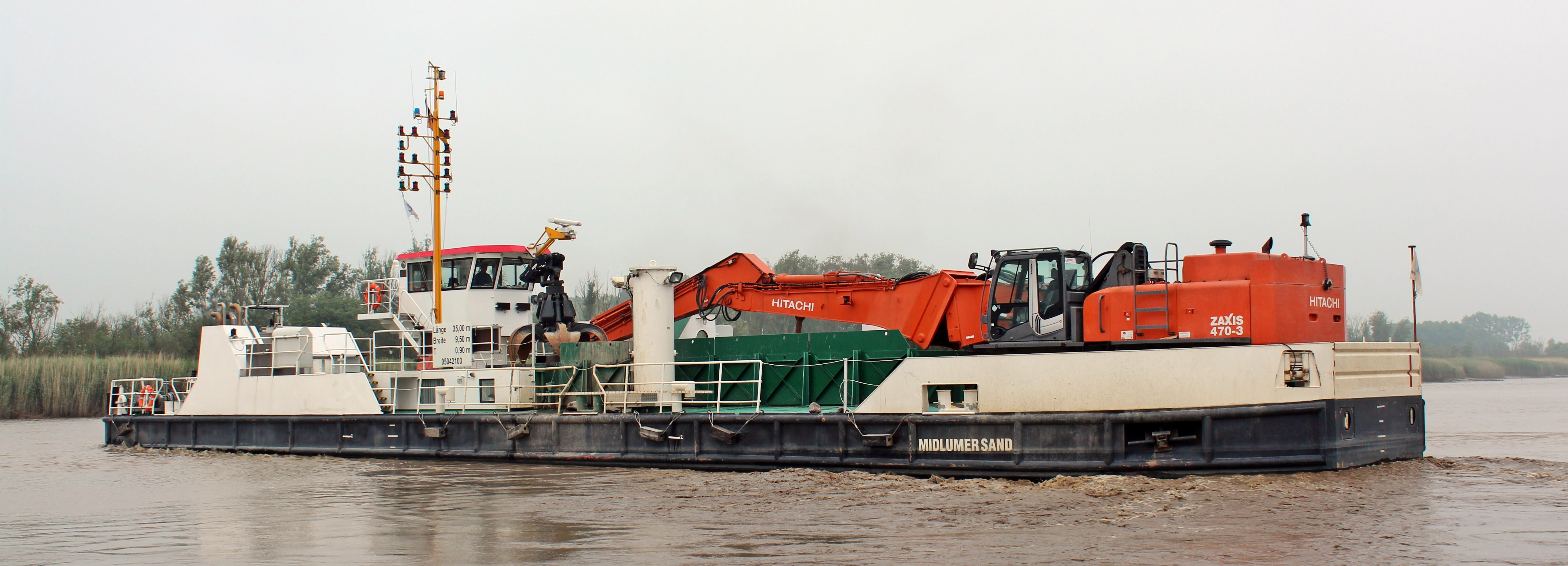 Das Faaborg-System-Schiff Midlumer Sand, ein Arbeitsschiff des WSA Emden.